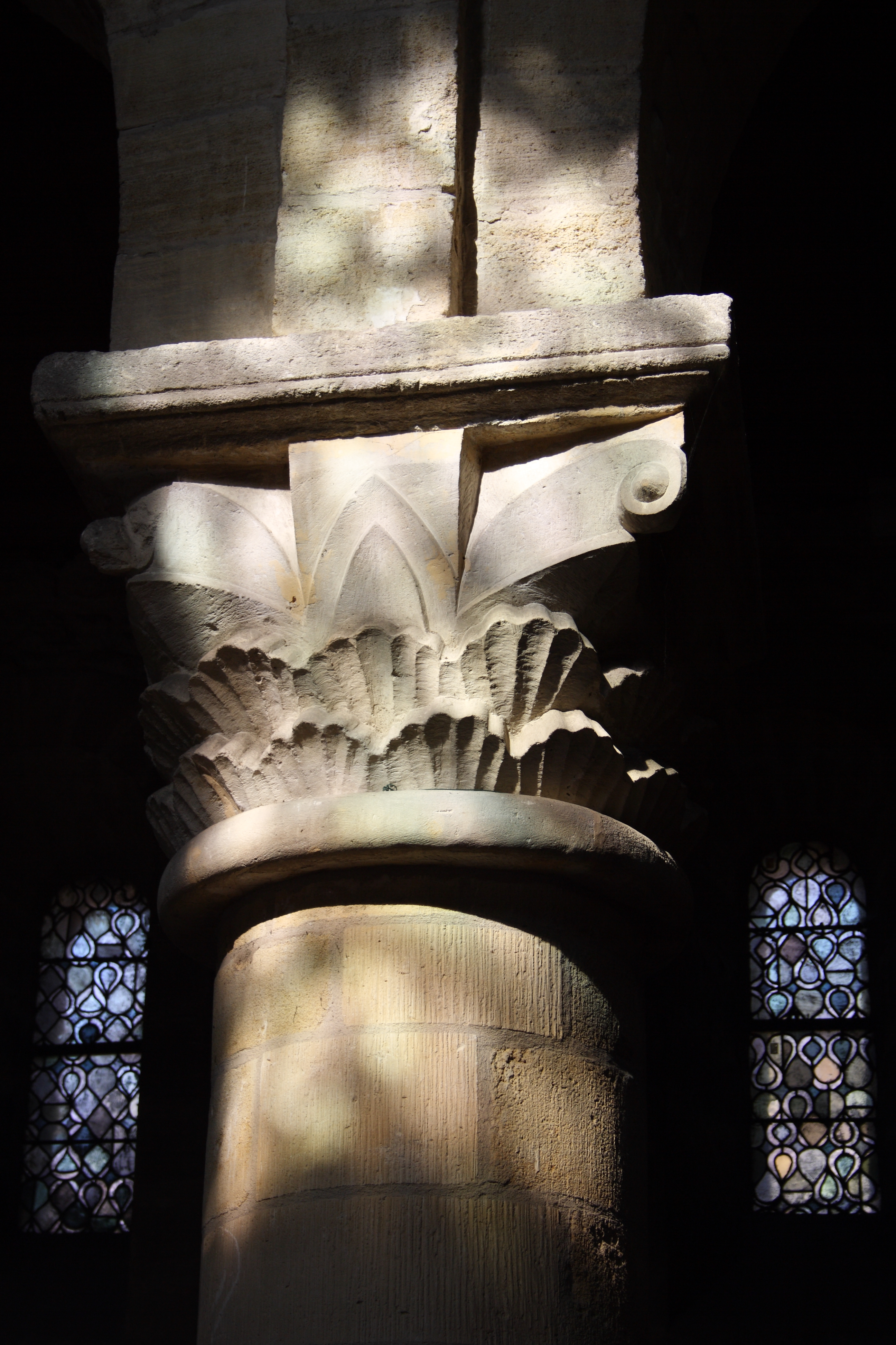 Kirche Sainte-Anne in Gassicourt, einem Stadtteil von Mantes-la-Jolie im Département Yvelines (Île de France), romanisches Kapitell